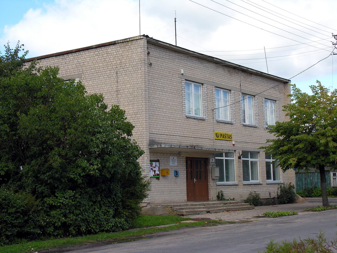 Židikai, Mažeikių raj. Židikų seniūnijos administracijos pastatas ir paštas Foto: Algirdas, 2006 m. rugsėjo 9 d., Lietuva